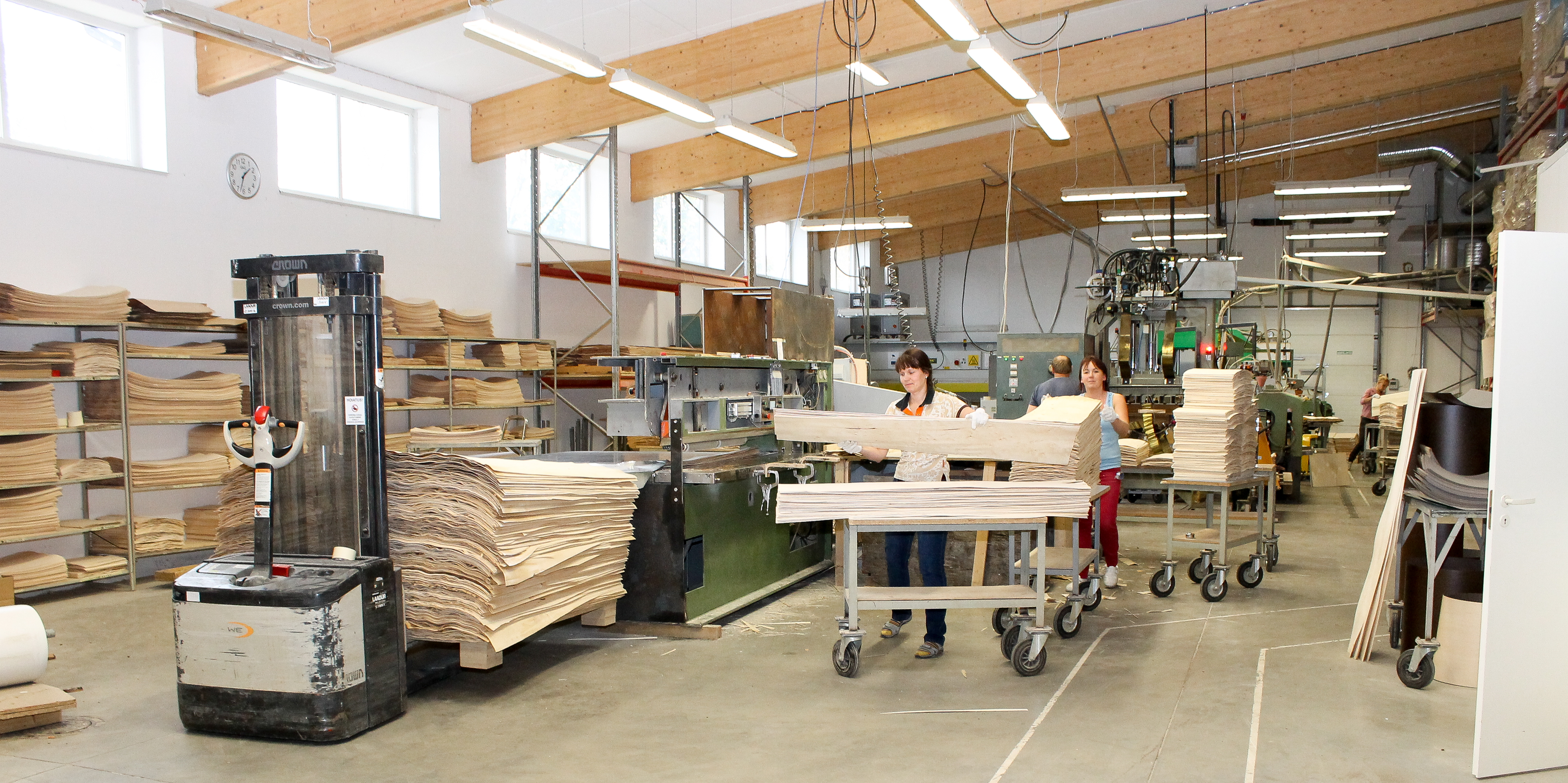 Pixner OÜ, Kadrina